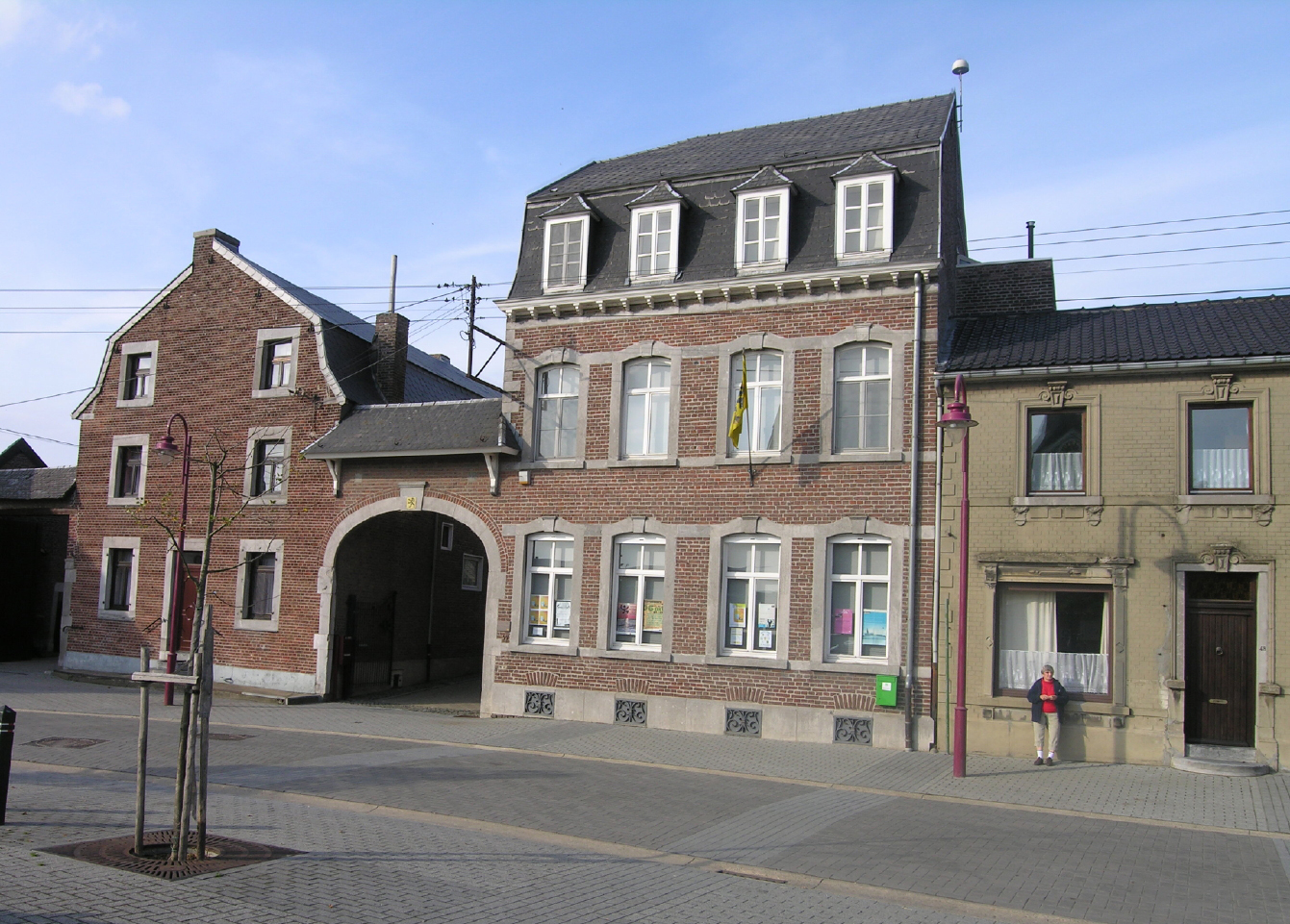 Casa noble a Moelingen